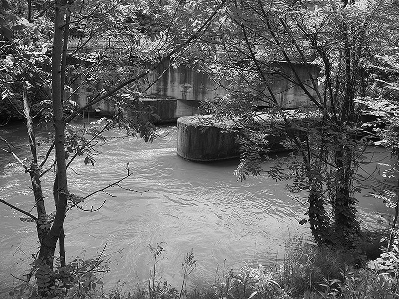 Hier beginnt der (rechte) Mühlgang im Norden von Graz. Blick vom linken Ufer des Mühlgangs auf den wirbelnden Auslauf des Kleinwasserkraftwerks, das neu seit der Errichtung des Murkraftwerks Weinzödl (1982) den Mühlgang speist. Ab hier zugleich Paddeltrainingsstrecke (seit etwa 1986 von Peinhaupt genutzt, am 16. März 2016 vom Kanu Club Graz (KCG) Gerhard-Peinhaupt-Slalom getauft). Dieser Einlauf mit erratischem Wirbelpilz war mit dem Boot befahrbar, bis hier niedrig überquerend etwa 2016 (?) eine Betonrinne als Teil einer Fischaufstiegshilfe für die Mur errichtet wurde.